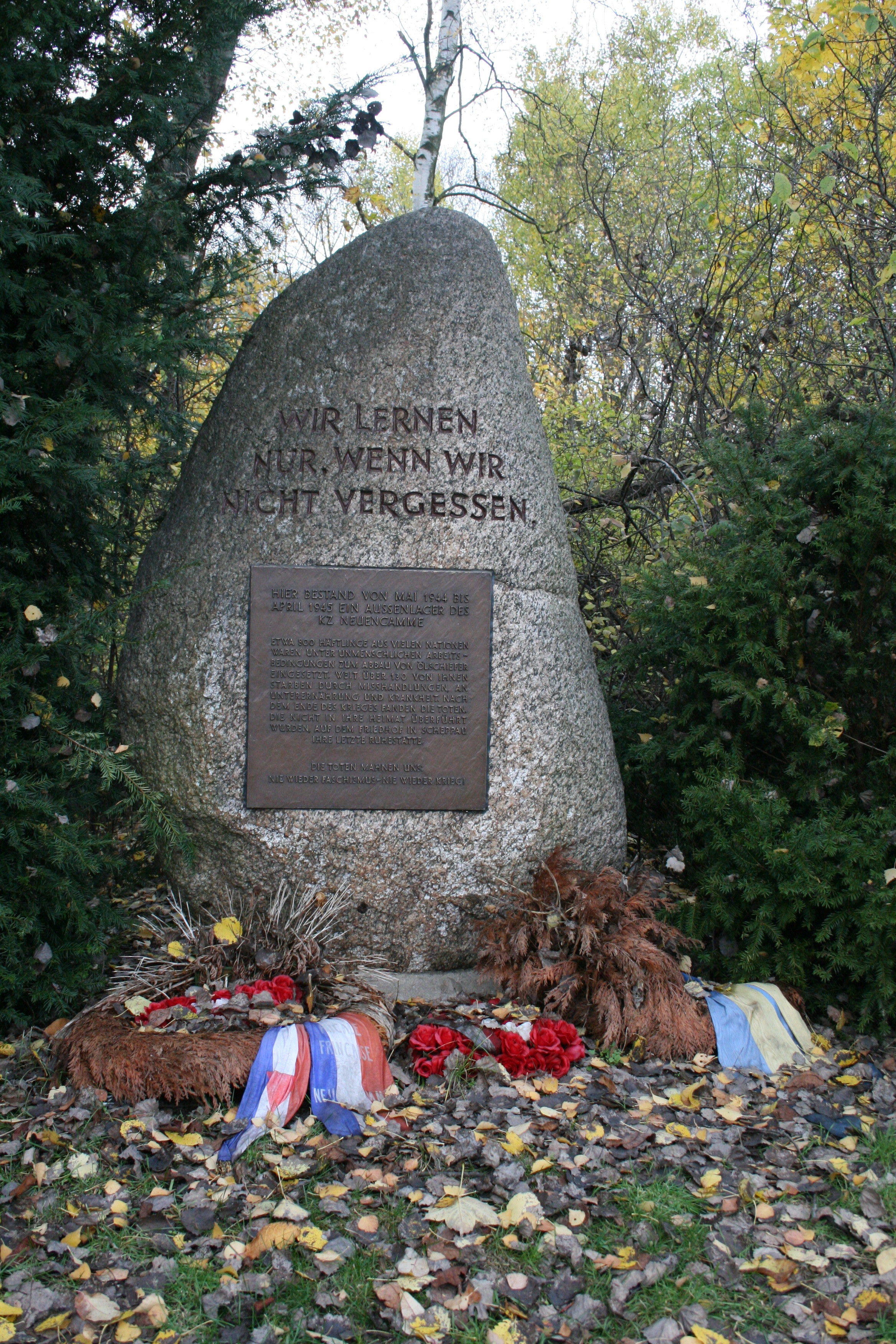 KZ Schandelah, Gedenkstein am Lagerplatz